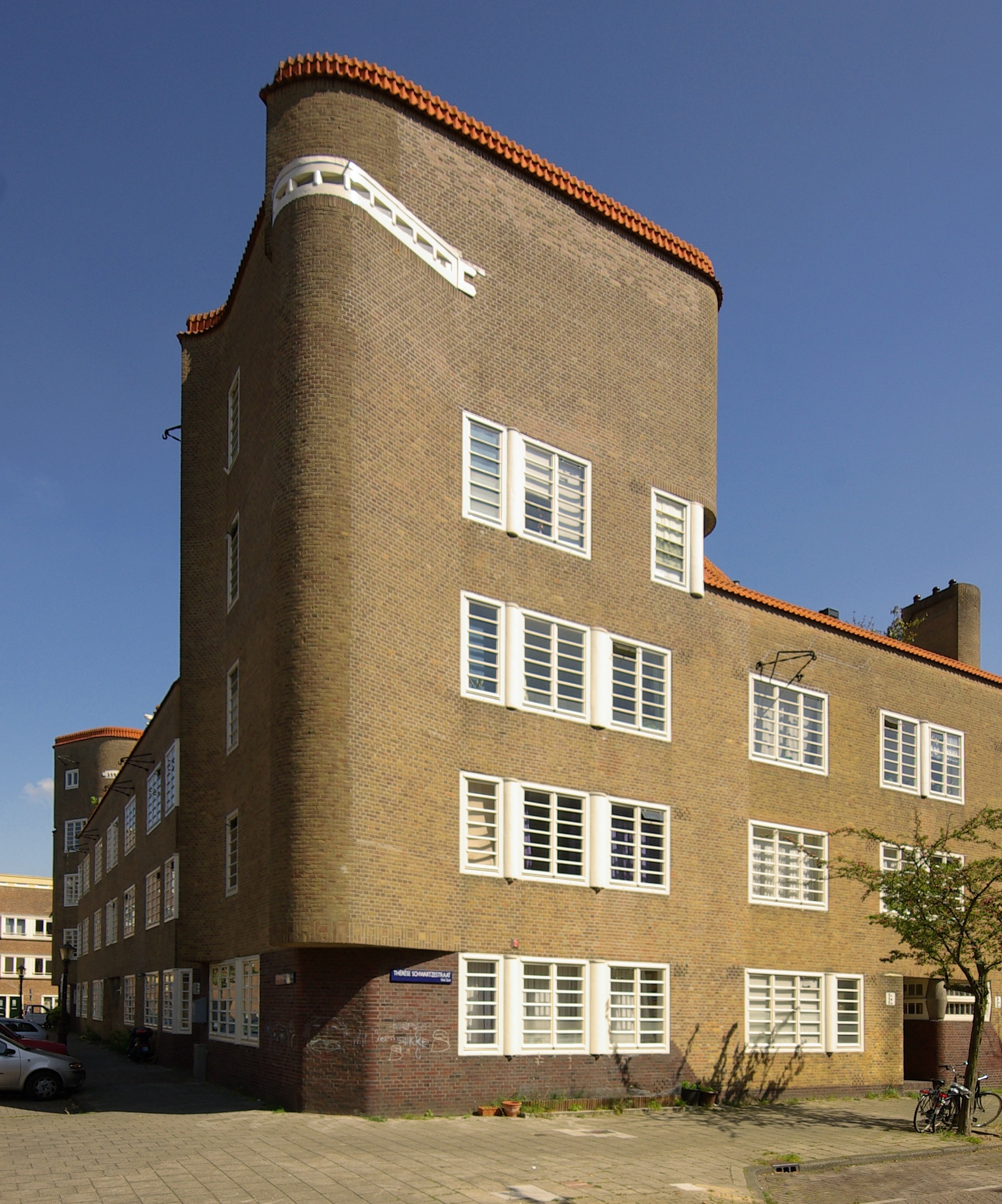 Complex van de woningbouwvereniging De Dageraad (1918-1923) in Amsterdam, architecten: Michel de Klerk en Piet Kramer 27″ N, 4° 53′ 51.75″ E